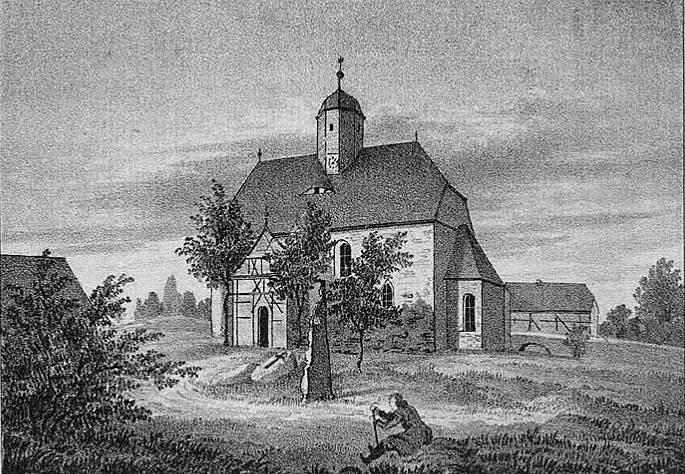 Diese Zeichnung der Chursdorfer Christuskirche stammt ungefähr aus dem Jahre 1840 als es in Seelingstädt / Chursdorf die Bahnlinie noch nicht gab. An der Stelle des Steinmahles (Bildmitte) steht heute ein Baum, der vor über 100 Jahren mit den Wurzeln nach oben gepflanzt worden sein soll.